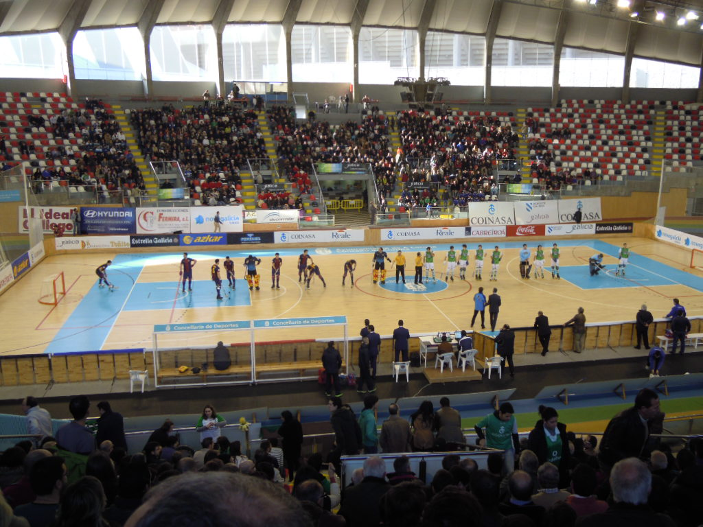 Hockey Club Liceo da Coruña e o FC Barcelona no Pazo dos Deportes de Riazor